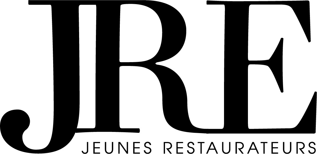 Das Logo der Jeunes Restaurateurs